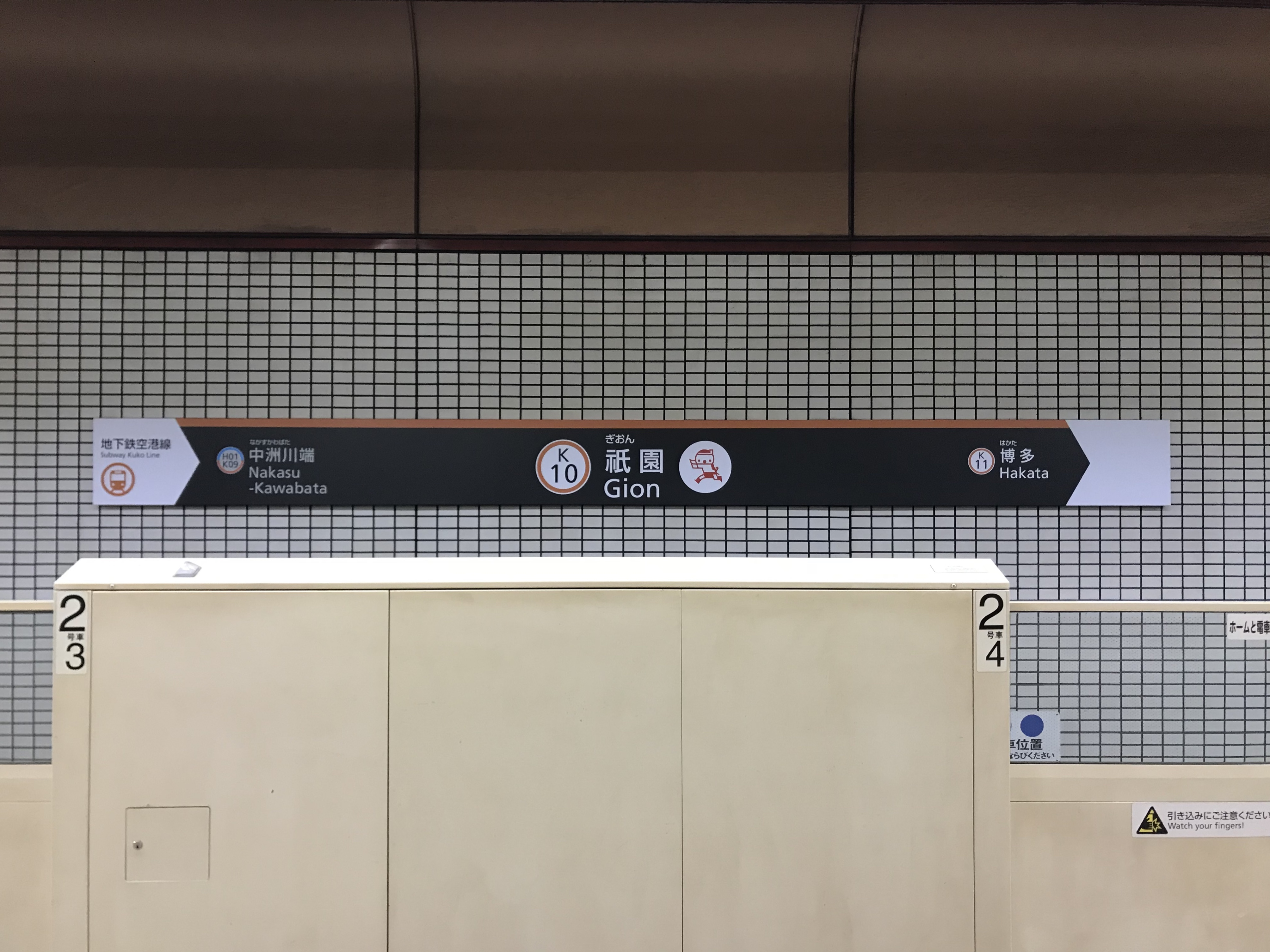 祇園駅の駅名標。イラストは博多祇園山笠